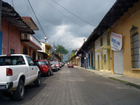 Una tipica calle de Coatepec